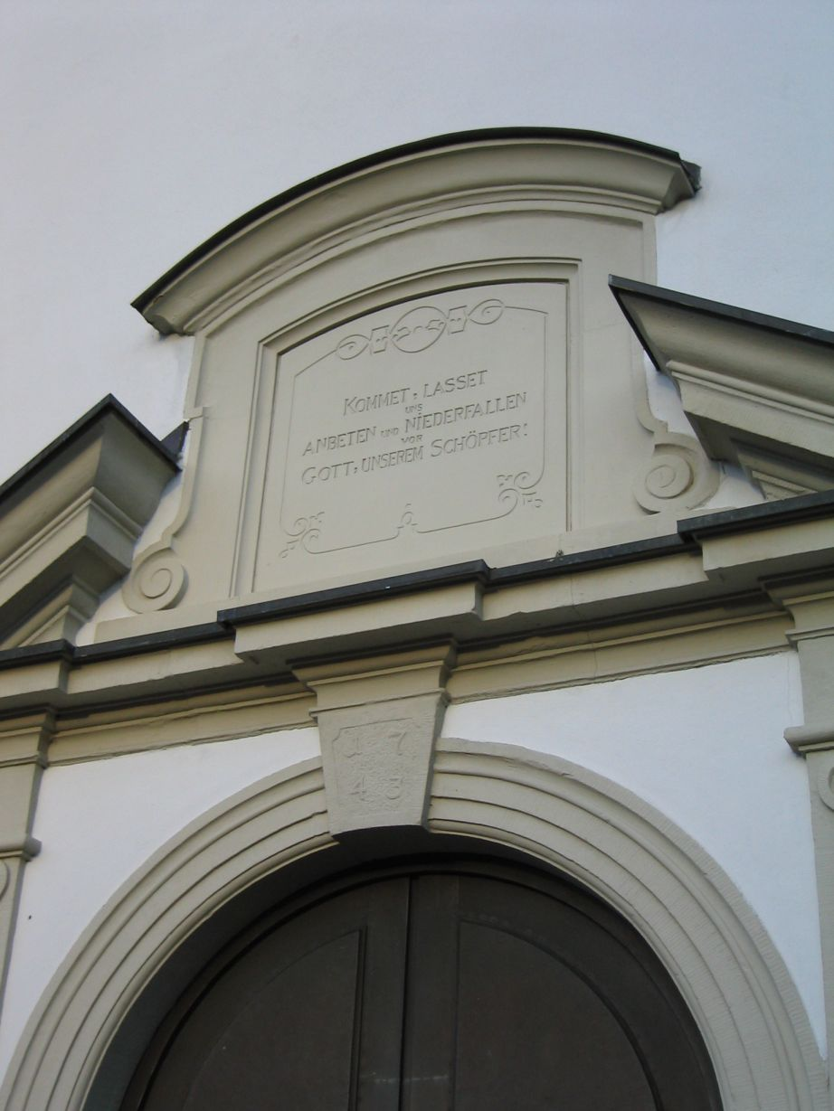 Eingang zu St. Georg in Billigheim-Allfeld